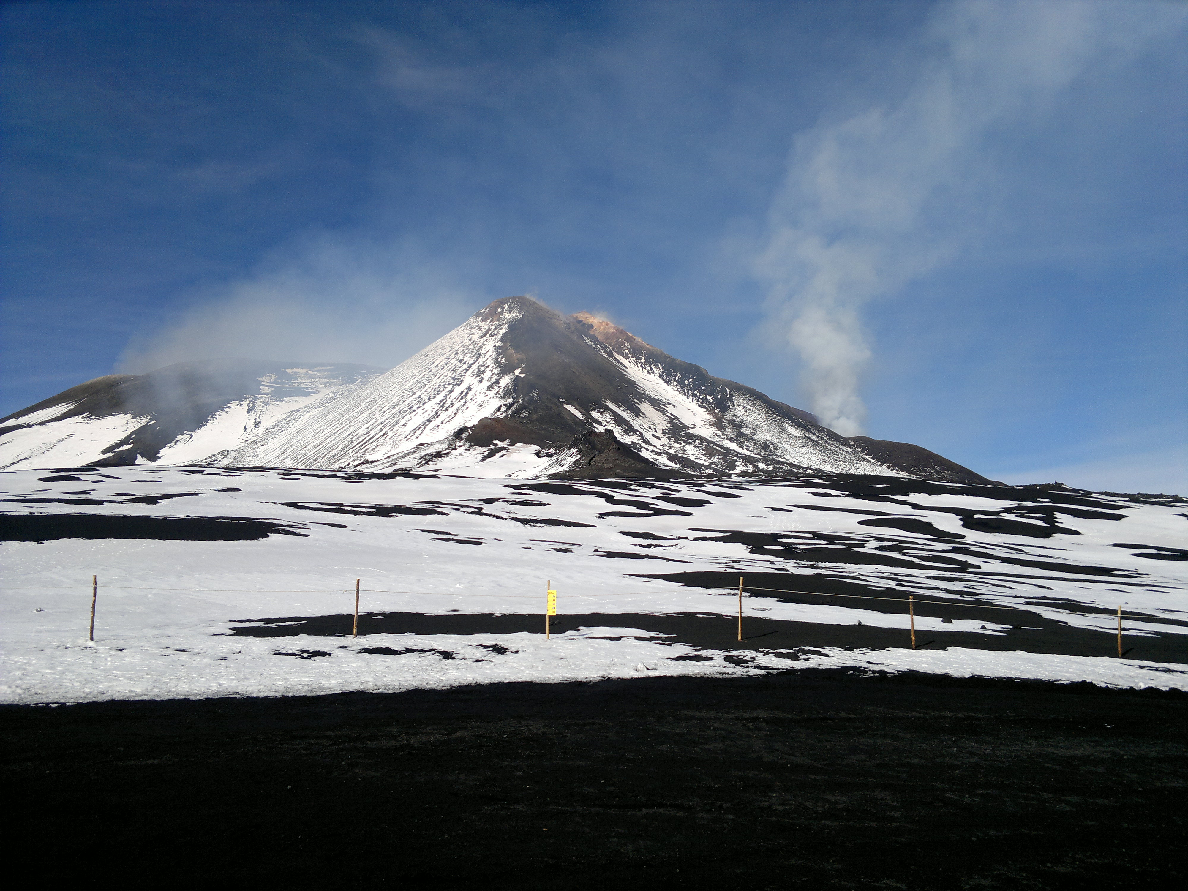 Центральный кратер Этны